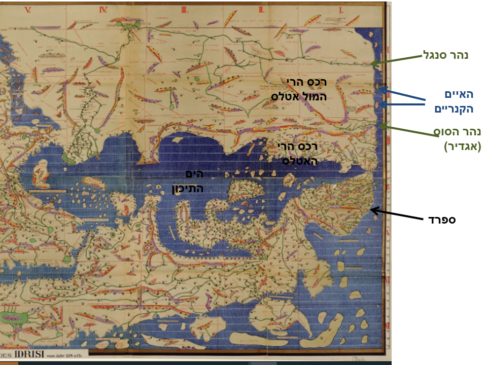 צפון מערב אפריקה כפי שמשורטט במפתו של הגיאוגרף אל אדריסי